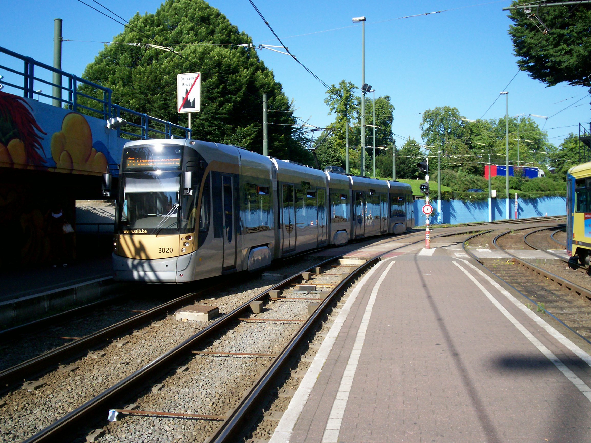 T 3000 de la ligne 23 à De Wand en direction de Vanderkindere